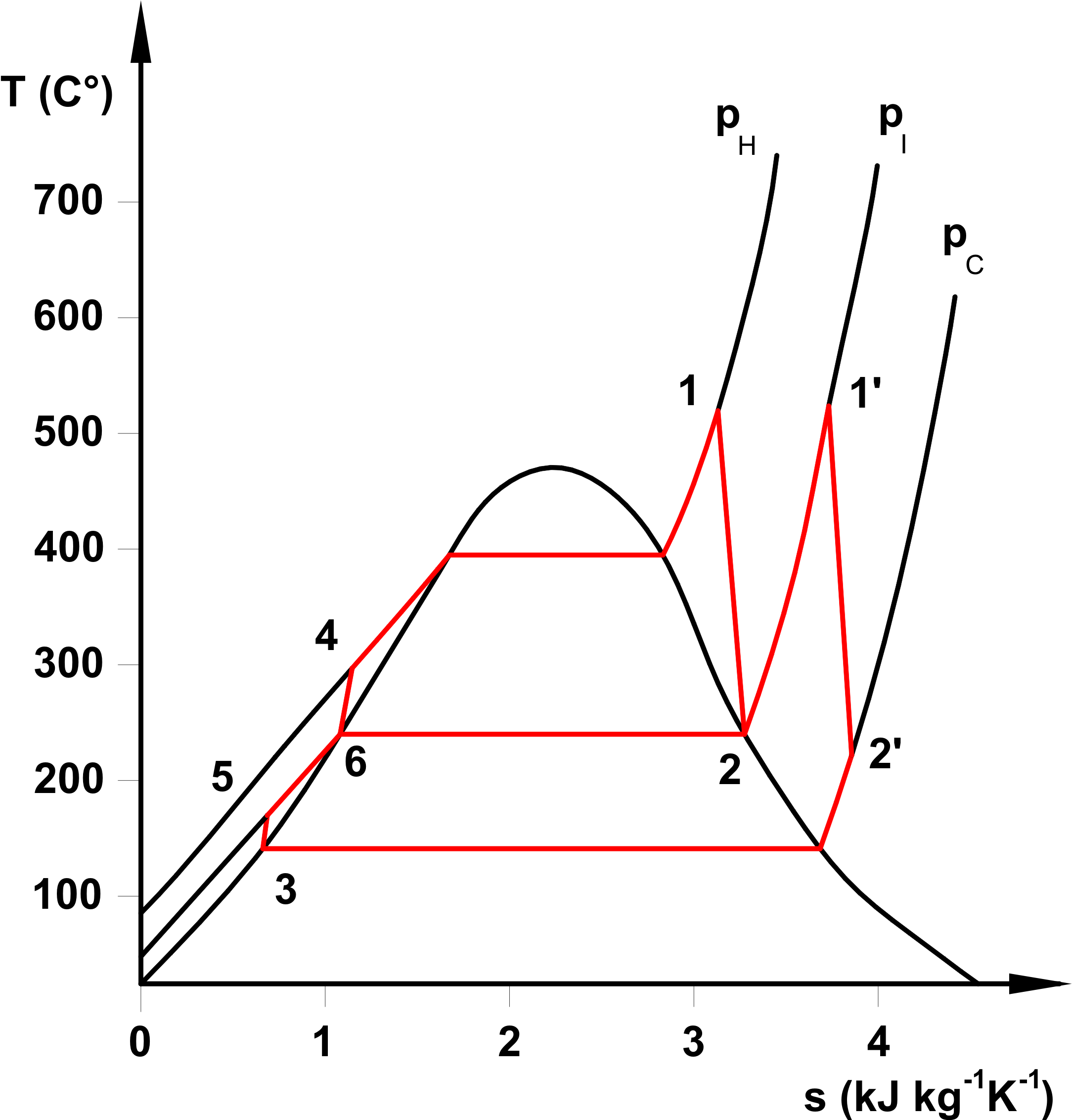 Regeneratív tápvíz-előmelegítés hatása a T-s diagramban